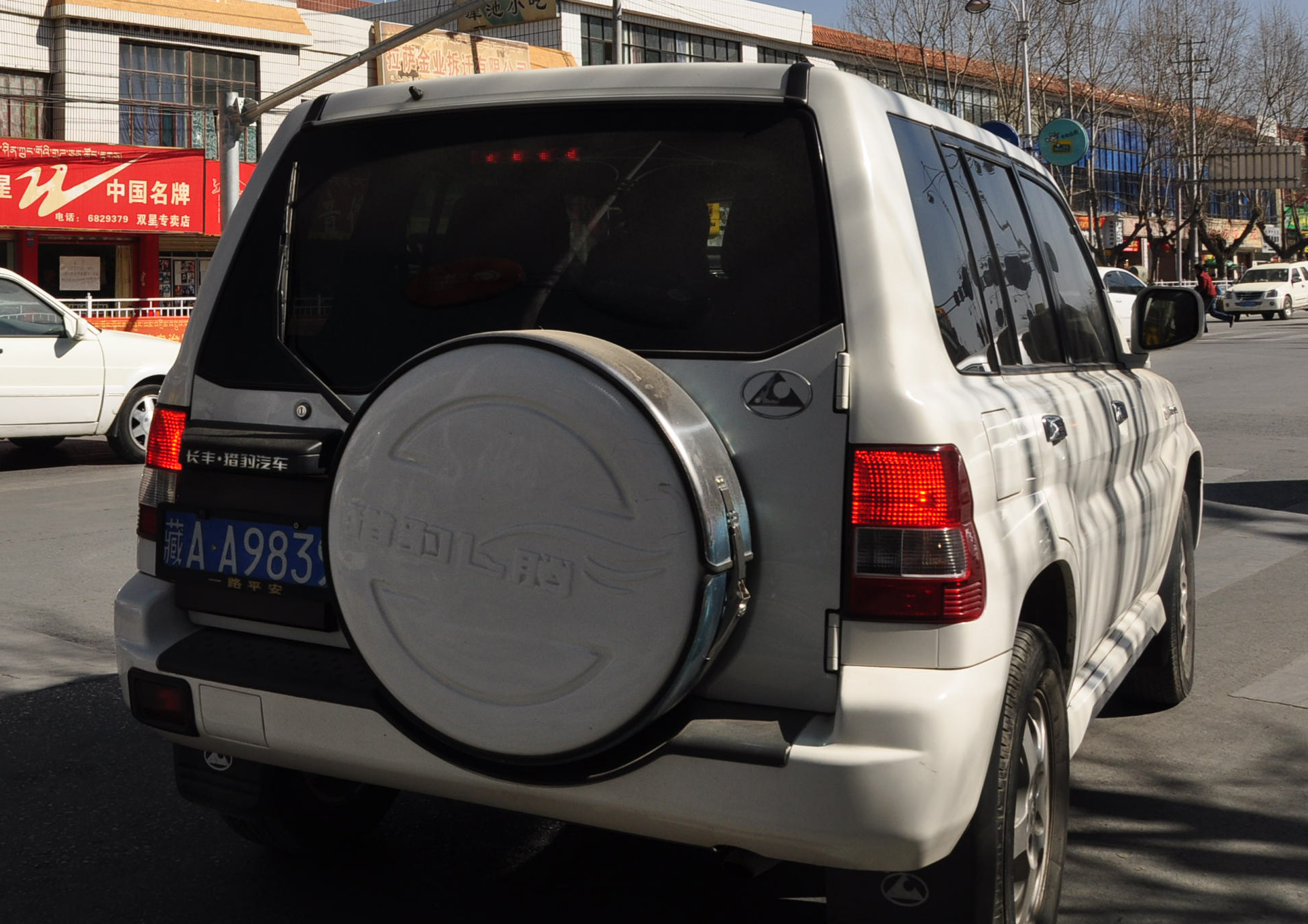 Changfeng Liebao Feiteng CFA6400 (license built Mitsubishi Pajero iO) in Lhasa, Tibet